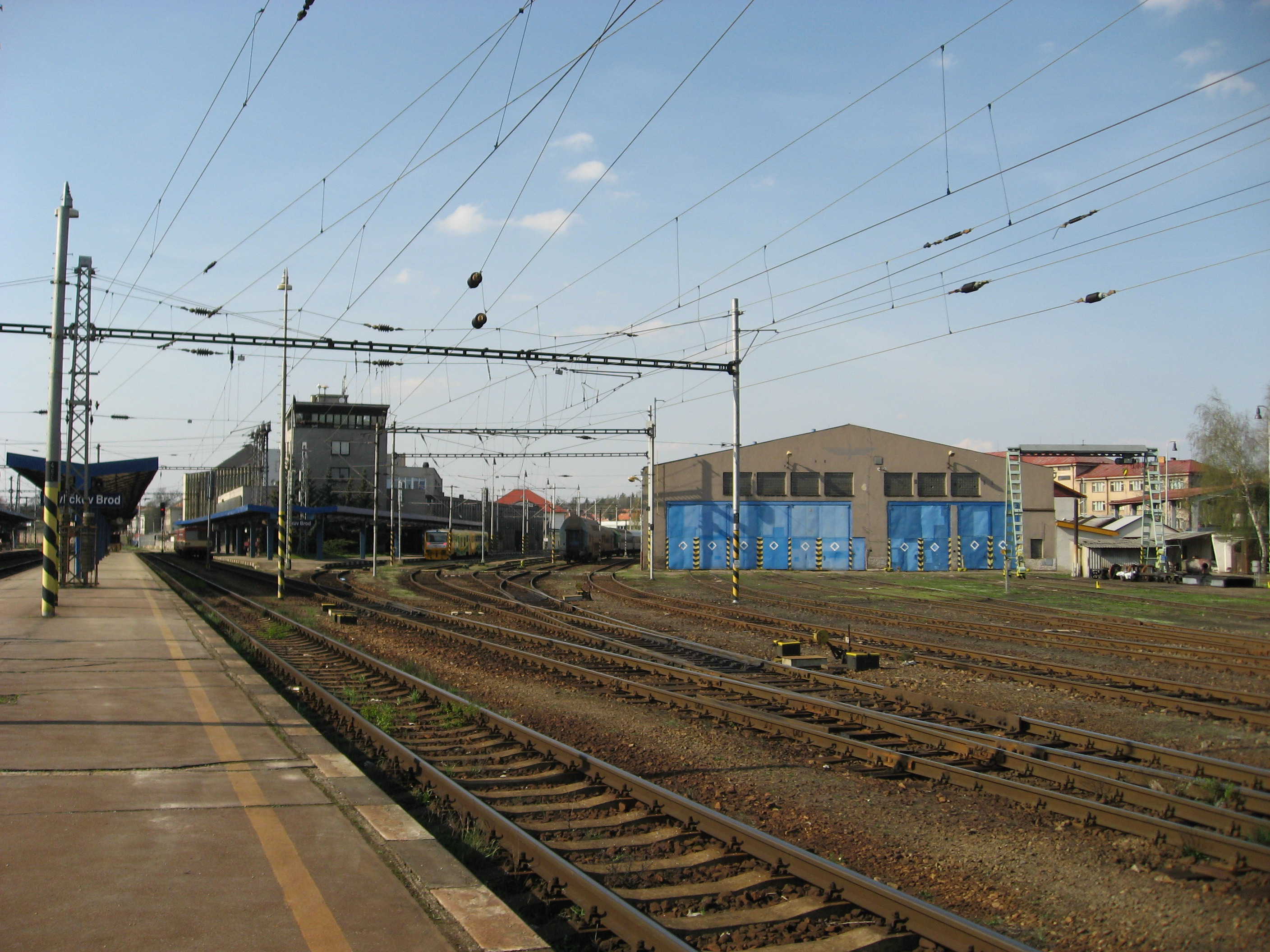 Havlíčkův Brod, železniční stanice